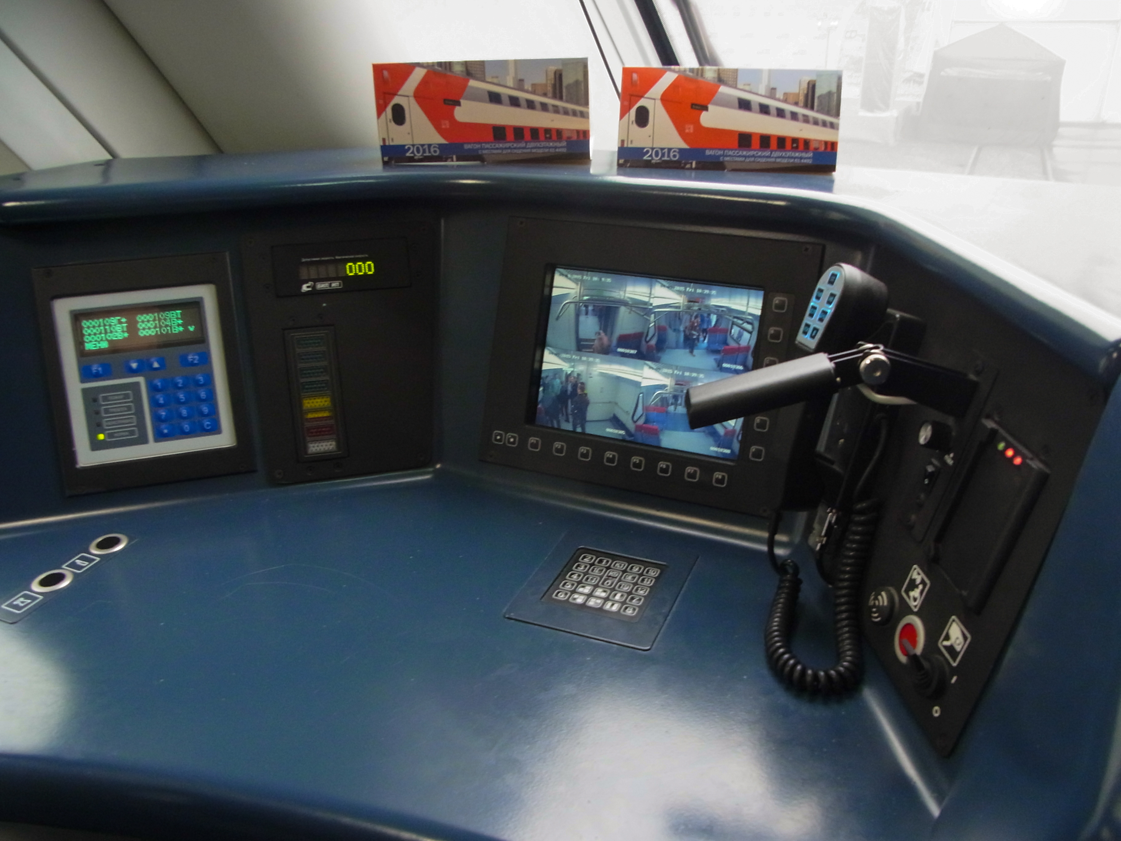 Пульт помощника машиниста в кабине электропоезда ЭГ2Тв-001